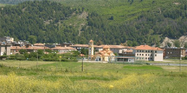 Memaliaj (Albania)